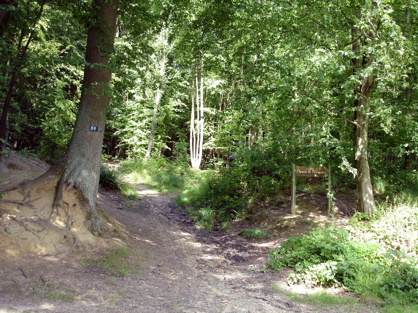 Chemin de l'Entonnoir en forêt de Montmorency (Val-d'Oise), France